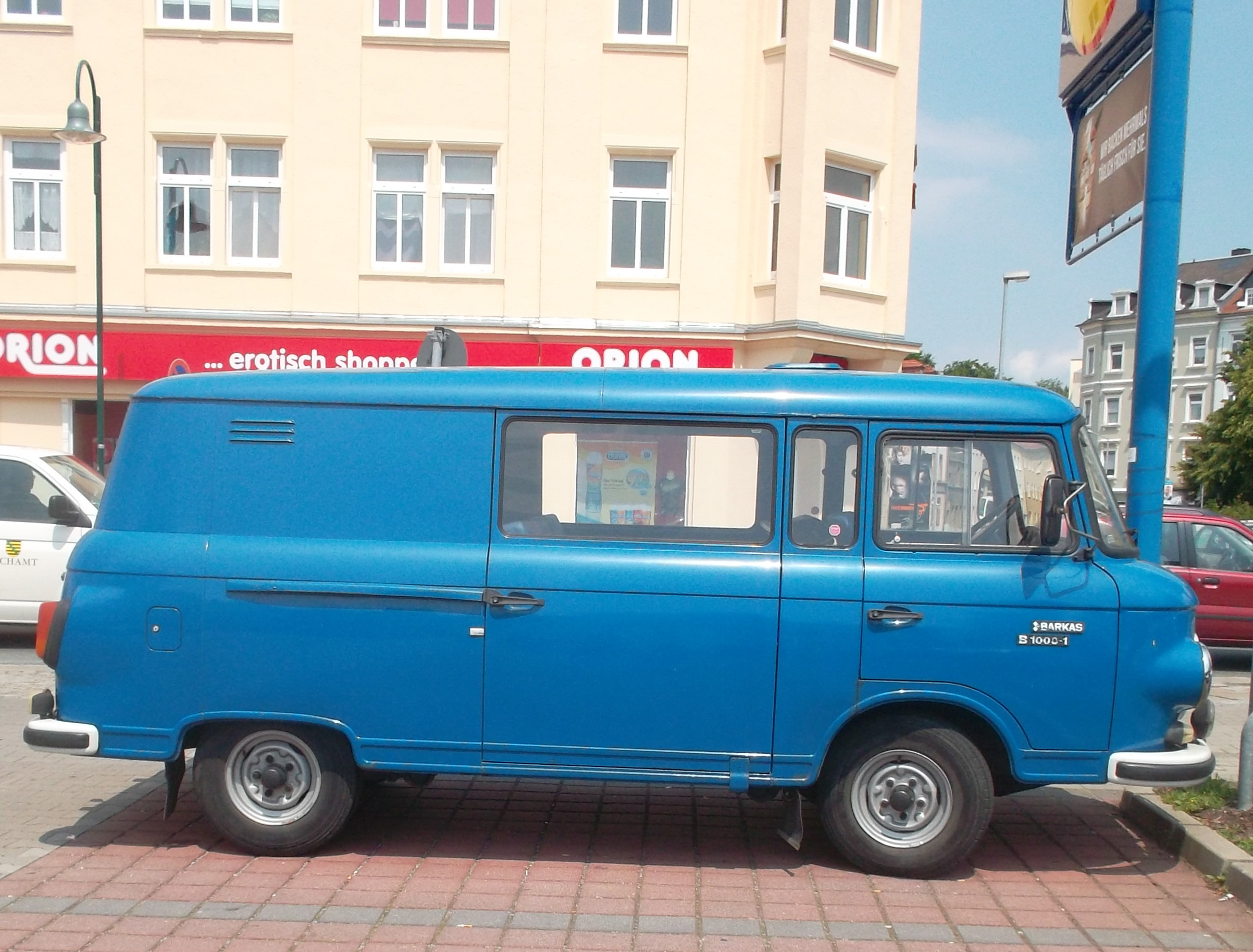 Gesamtansicht Barkas B 1000-1